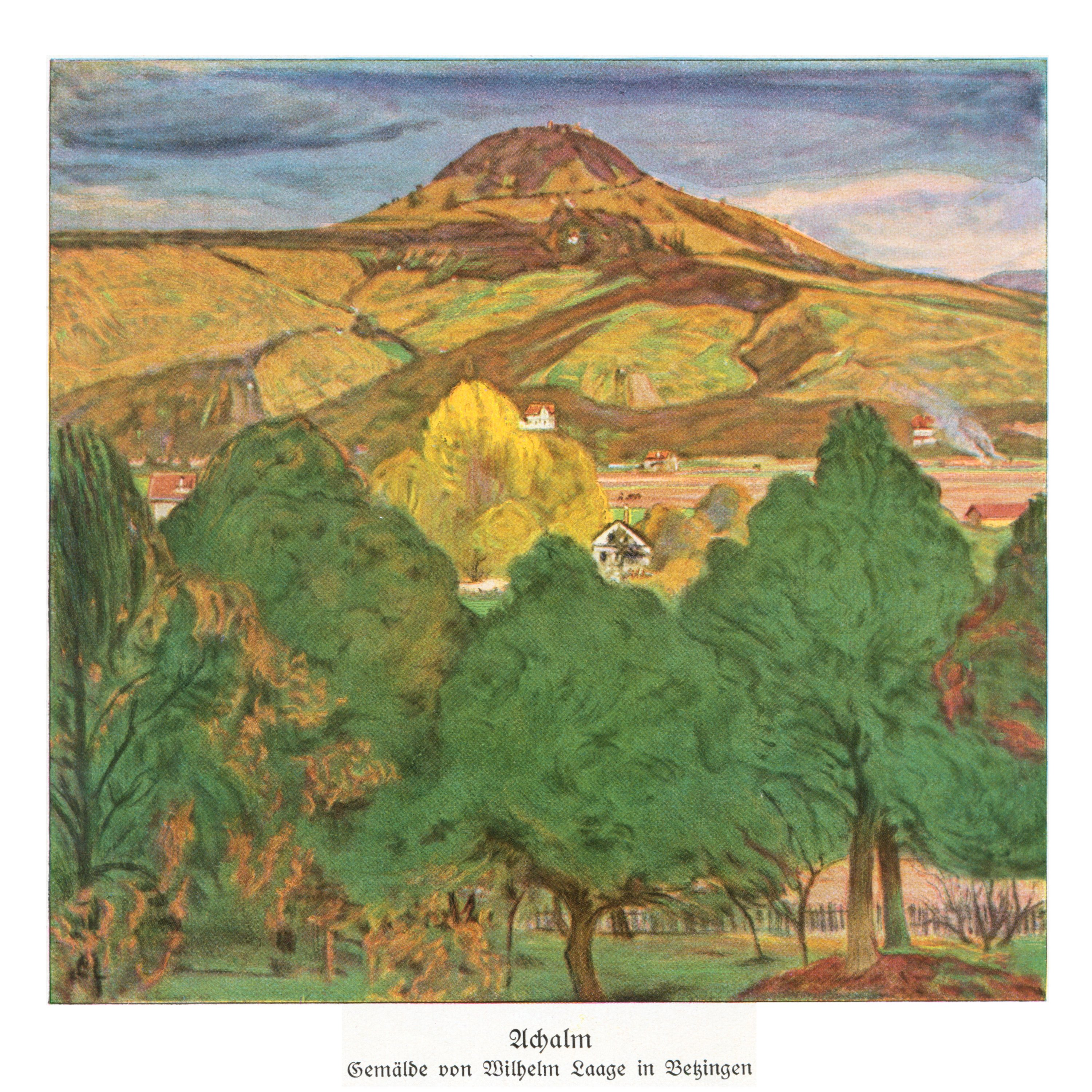 Achalm, Hausberg der Stadt Reutlingen.